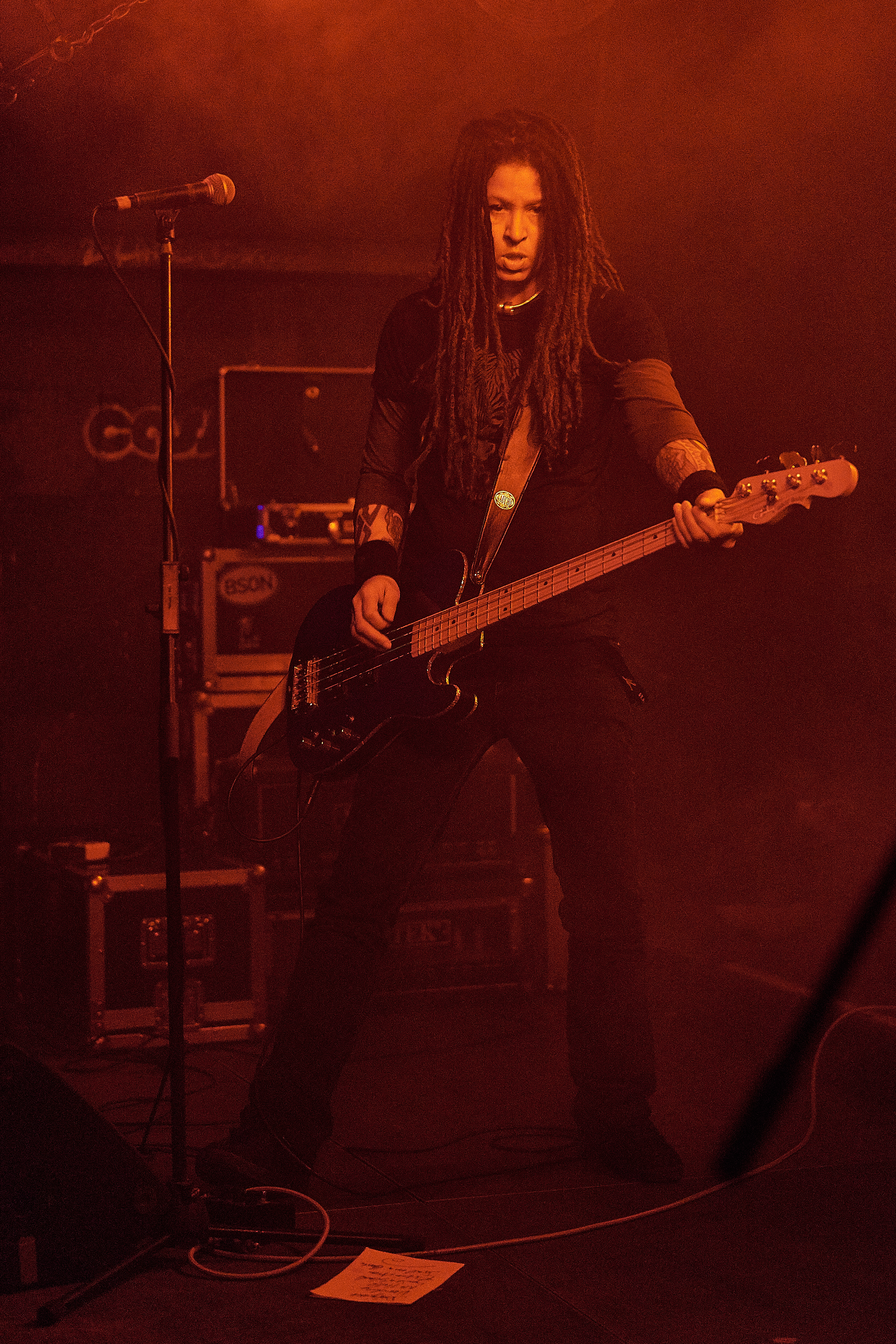 Berlinbased Sludge-/Doom band Treedeon live @ Cassiopeia, Berlin, 2016-01-28 Festivalsommer This photo was created with the support of donations to Wikimedia Deutschland in the context of the CPB project "Festival Summer". Personality rights warningAlthough this work is freely licensed or in the public domain, the person(s) shown may have rights that legally restrict certain re-uses unless those depicted consent to such uses. In these cases, a model release or other evidence of consent could protect you from infringement claims.